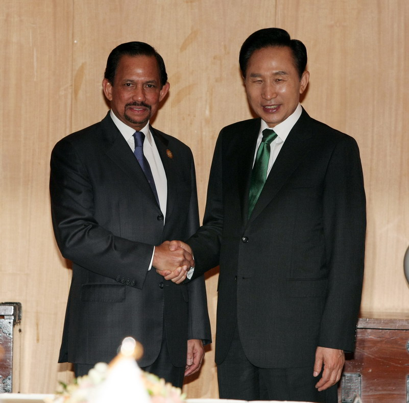 Korea-Brunei summit. June 01, 2009.